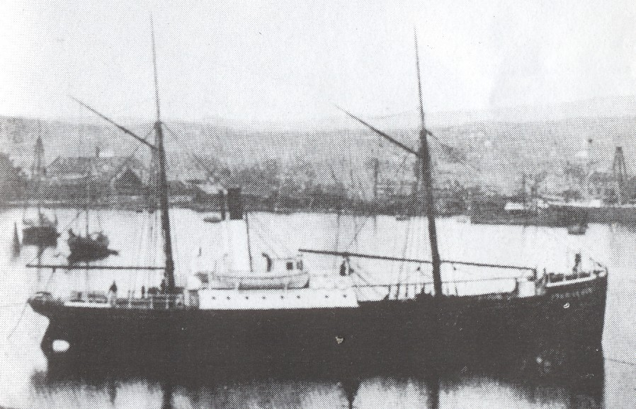 D/S John Schønning, tilhørte Grøtøy handelssted. Kopibeskuttelse varer i 70 år, og bildet er tatt sansynligvis midt på 1800-tallet.